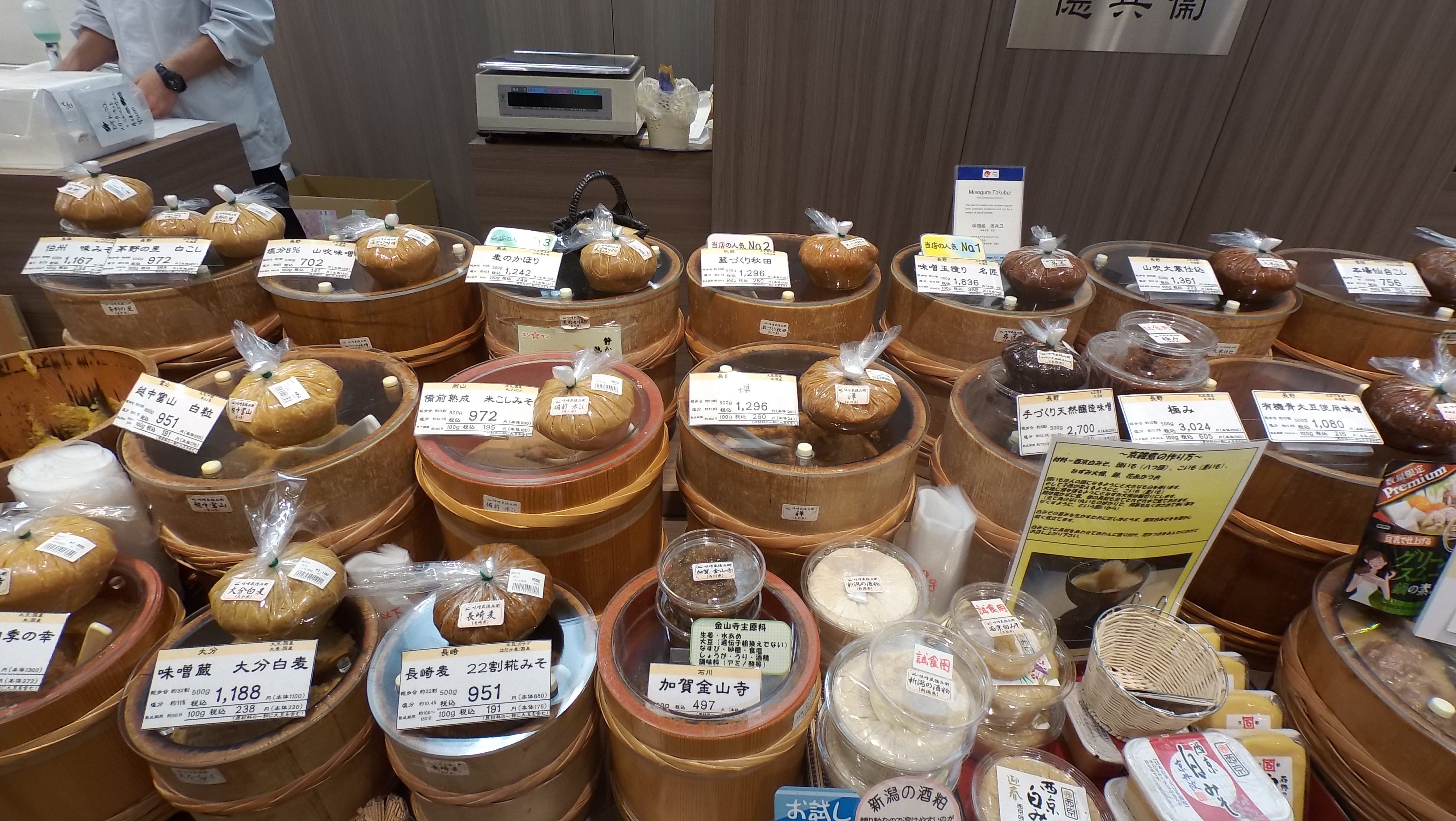 松屋 銀座本店